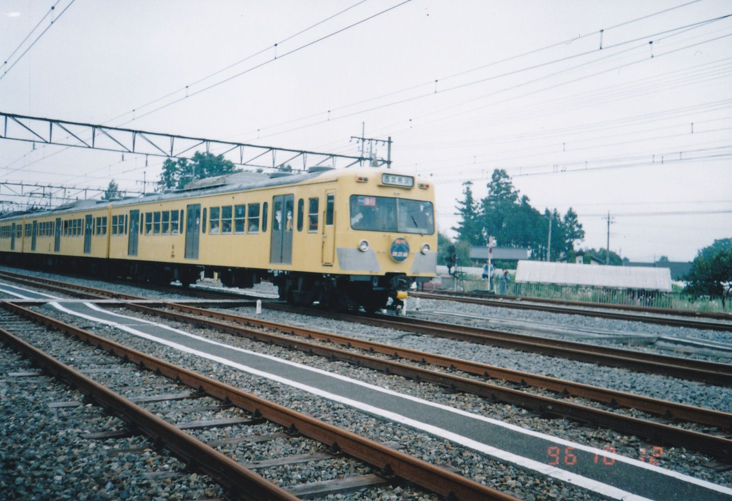 西武鉄道701系。横瀬駅にて(さよなら運転イベント)